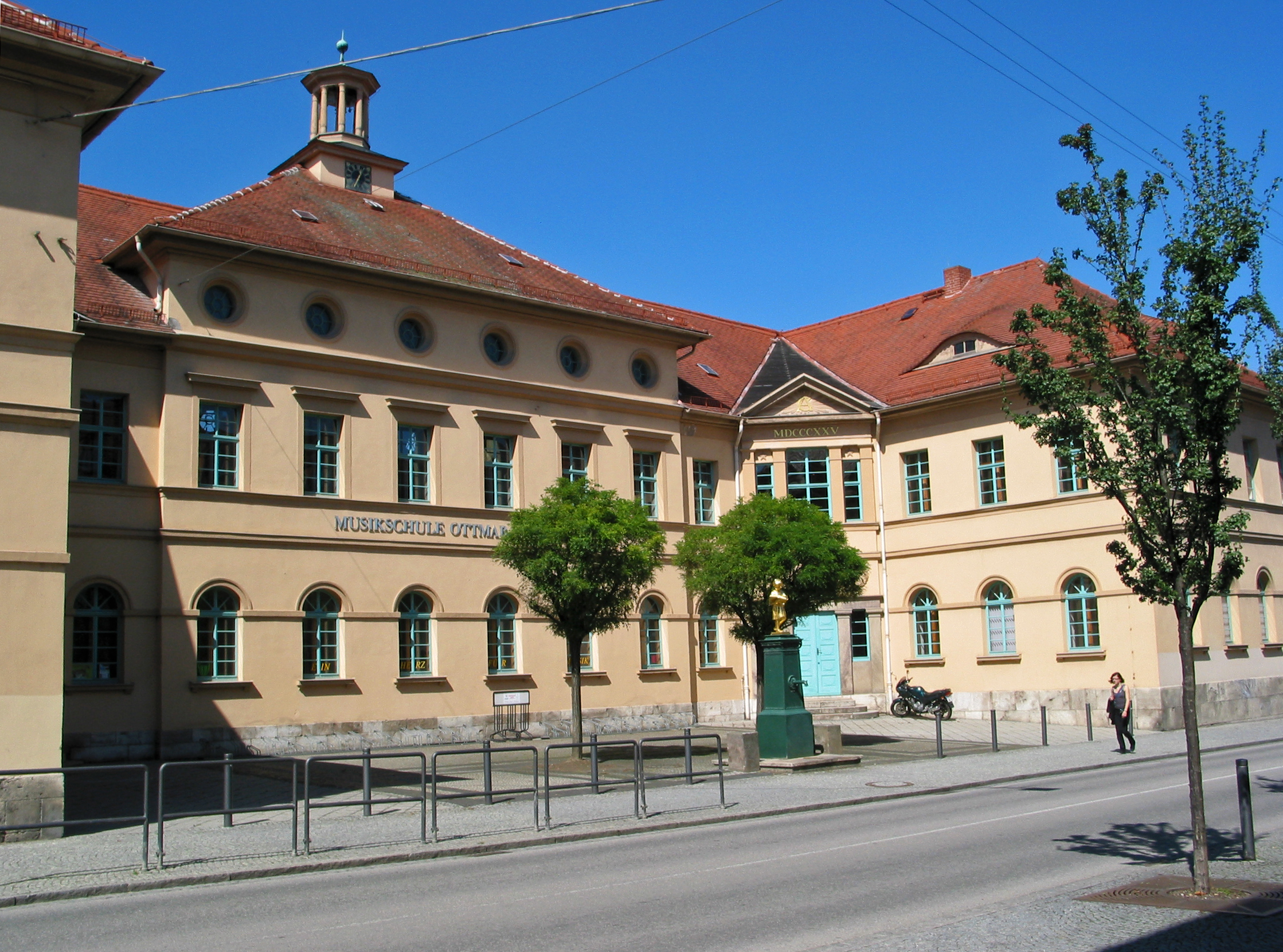 Ostansicht der ehemaligen Bürgerschule von 1825, heute Städtische Musikschule "Ottmar Gerster". Davor befindet sich seit 1858 der gusseiserne Bürgerschulbrunnen mit der goldenen Figur eines lesenden Knaben.